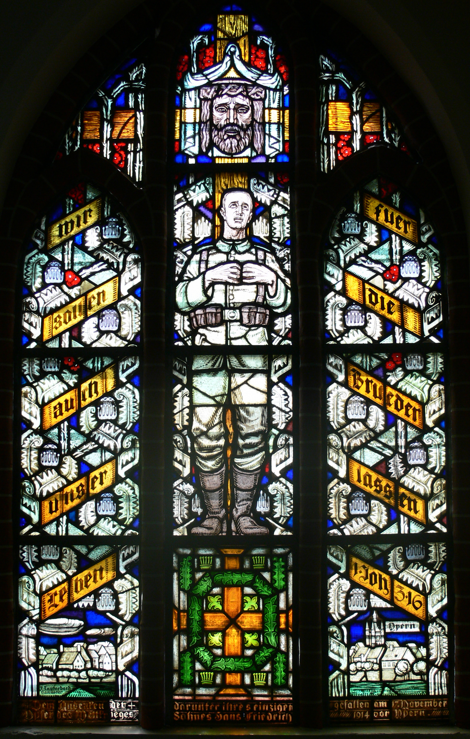 Lüneburg, Kirche St. Johannis Fenster zum Gedenken an den 1. Weltkrieg, nach 1918